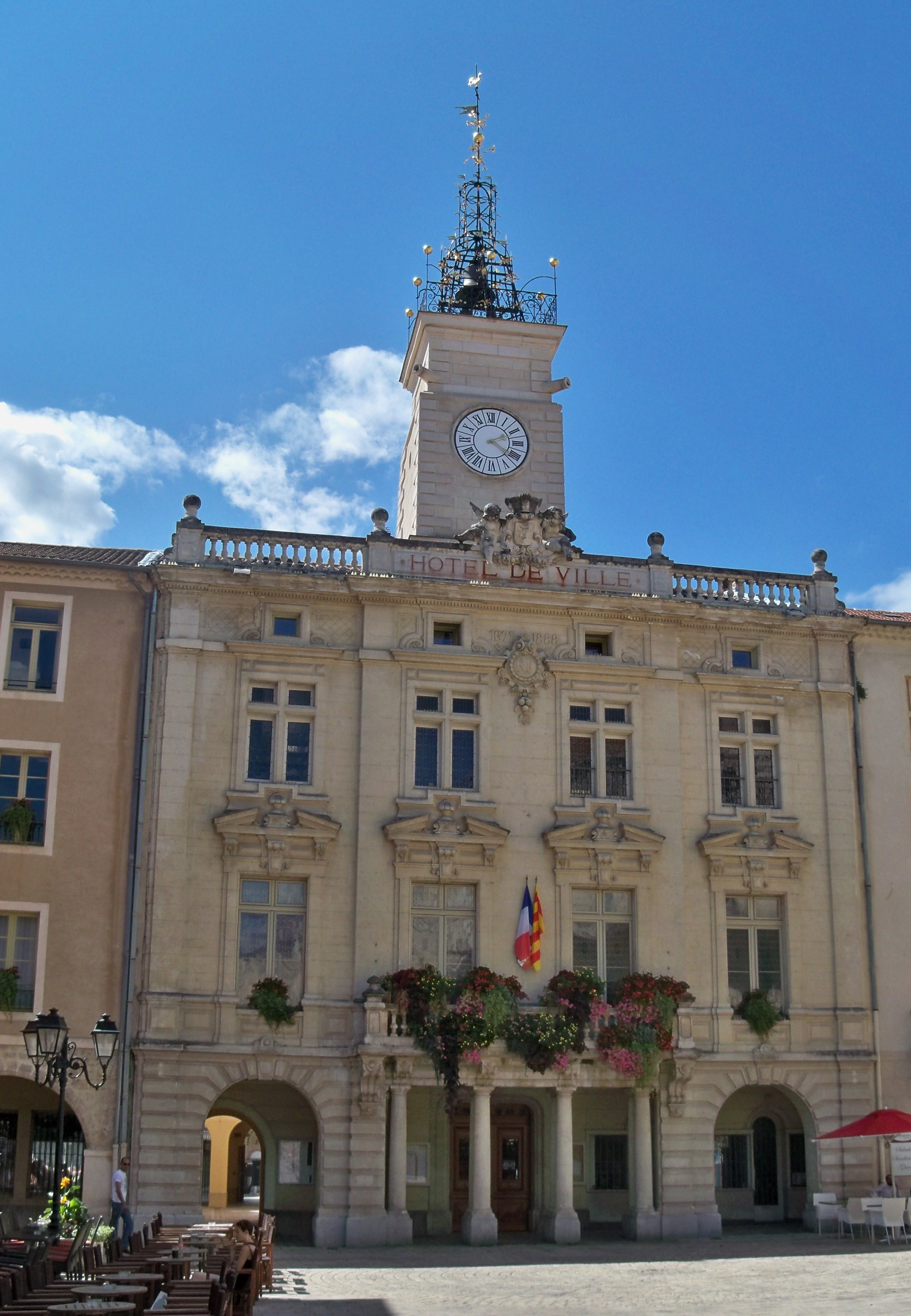 Mairie d'Orange, Vaucluse, France